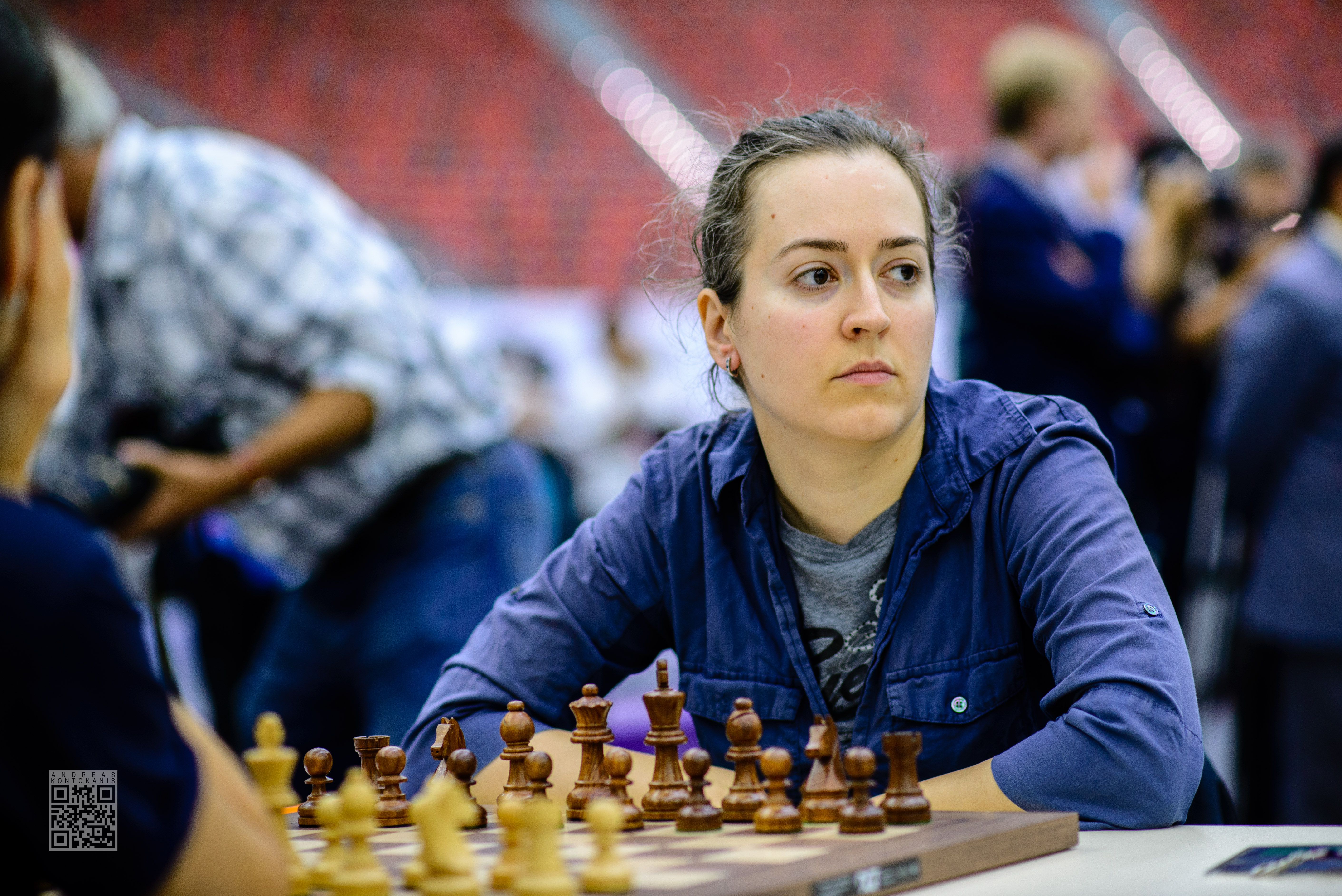 Krush Irina